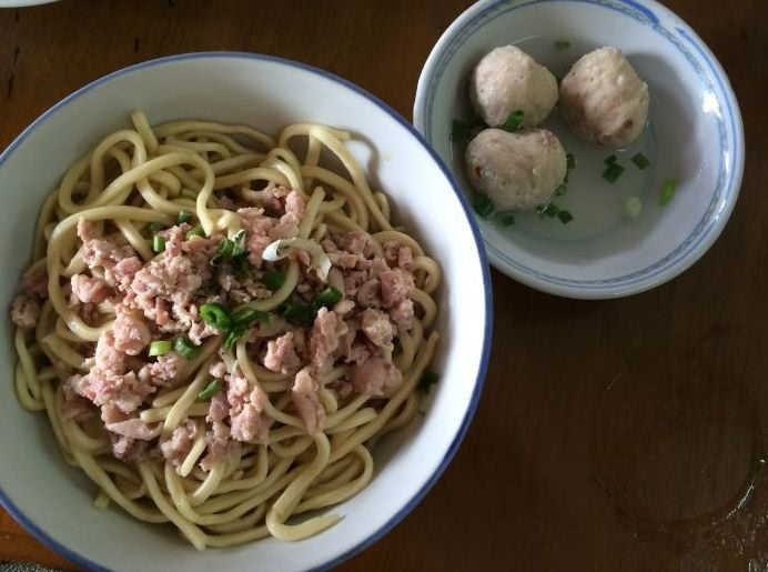 hakka noodle in Pandan Indah